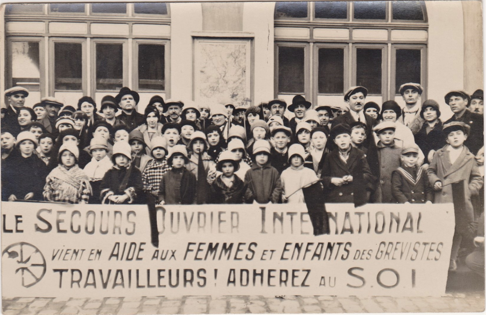 Campagne d'aide aux femmes et enfants de grévistes